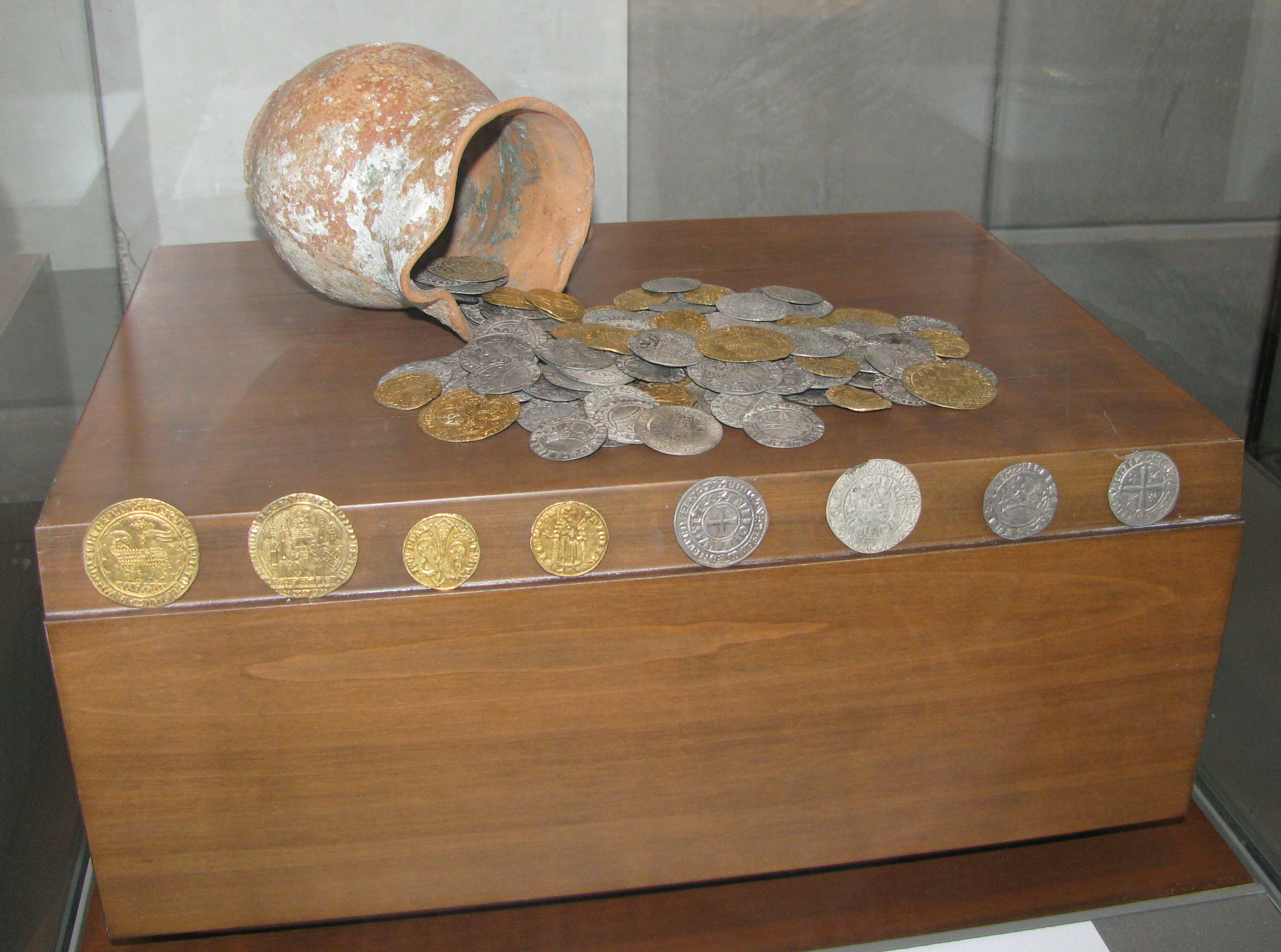 Trésor de monnaies d'argent et d'or du moyen-âge, découvert en 1993 place des Terreaux à Lyon - Musée des Beaux-Arts de Lyon